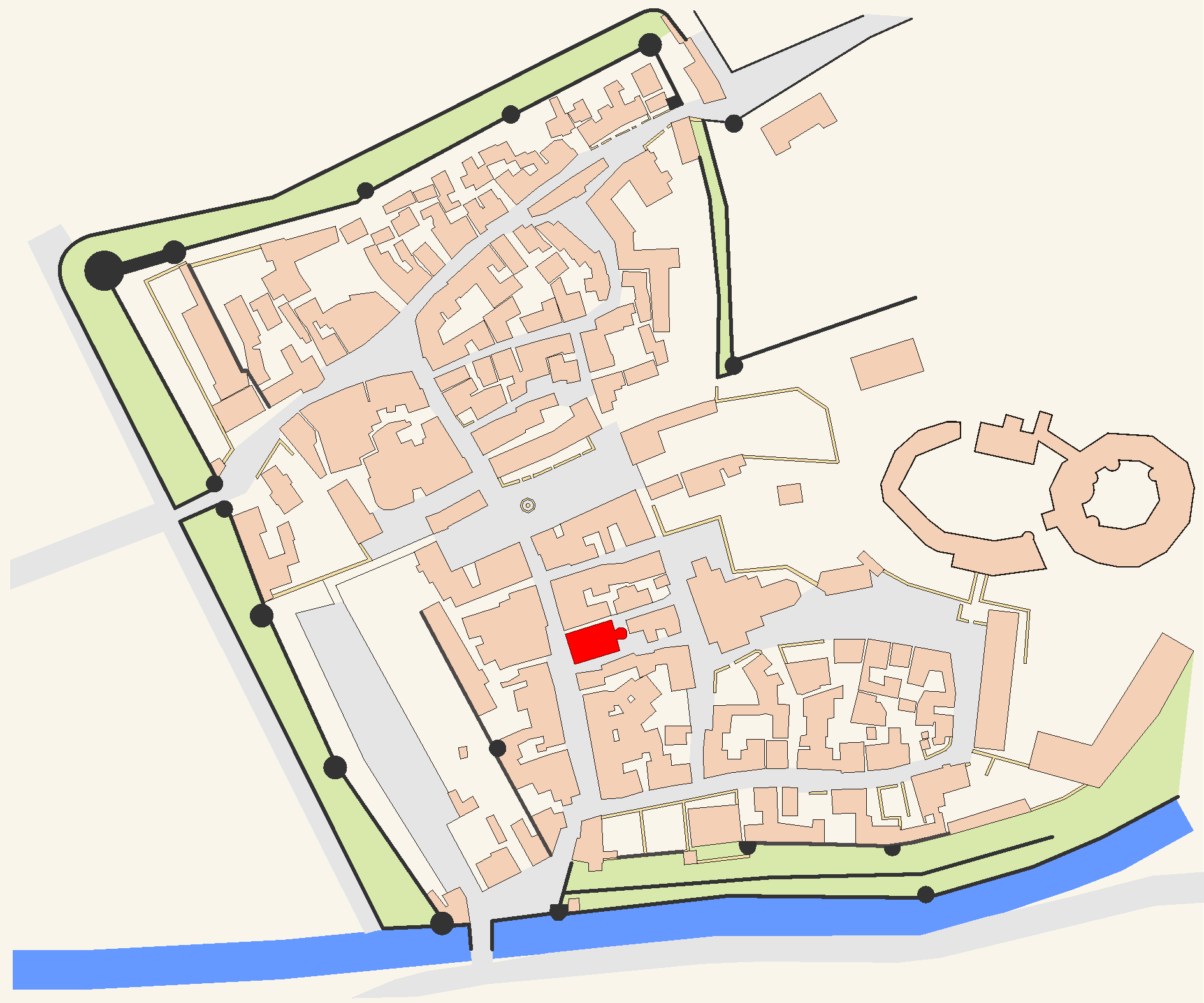 Stadtplan der Büdinger Altstadt - Hervorgehoben das historische Rathaus (Büdingen)